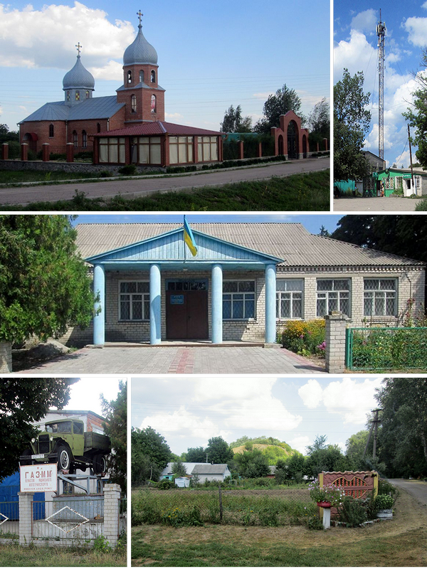 Верхній ряд: церква Архангела Михаїла; телевежа. Середній ряд: будівля сільської ради. Нижній ряд: пам'ятник ГАЗ-ММ; Луки («Рудикова гора»)